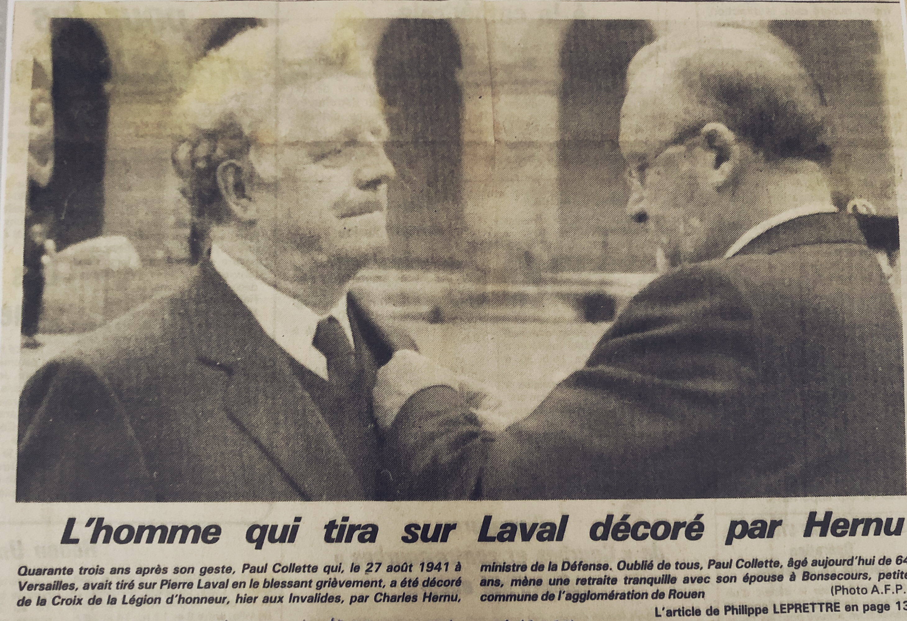 Paul Collette recevant sa Légion d’Honneur des mains du ministre de la défense Charles Hernu.